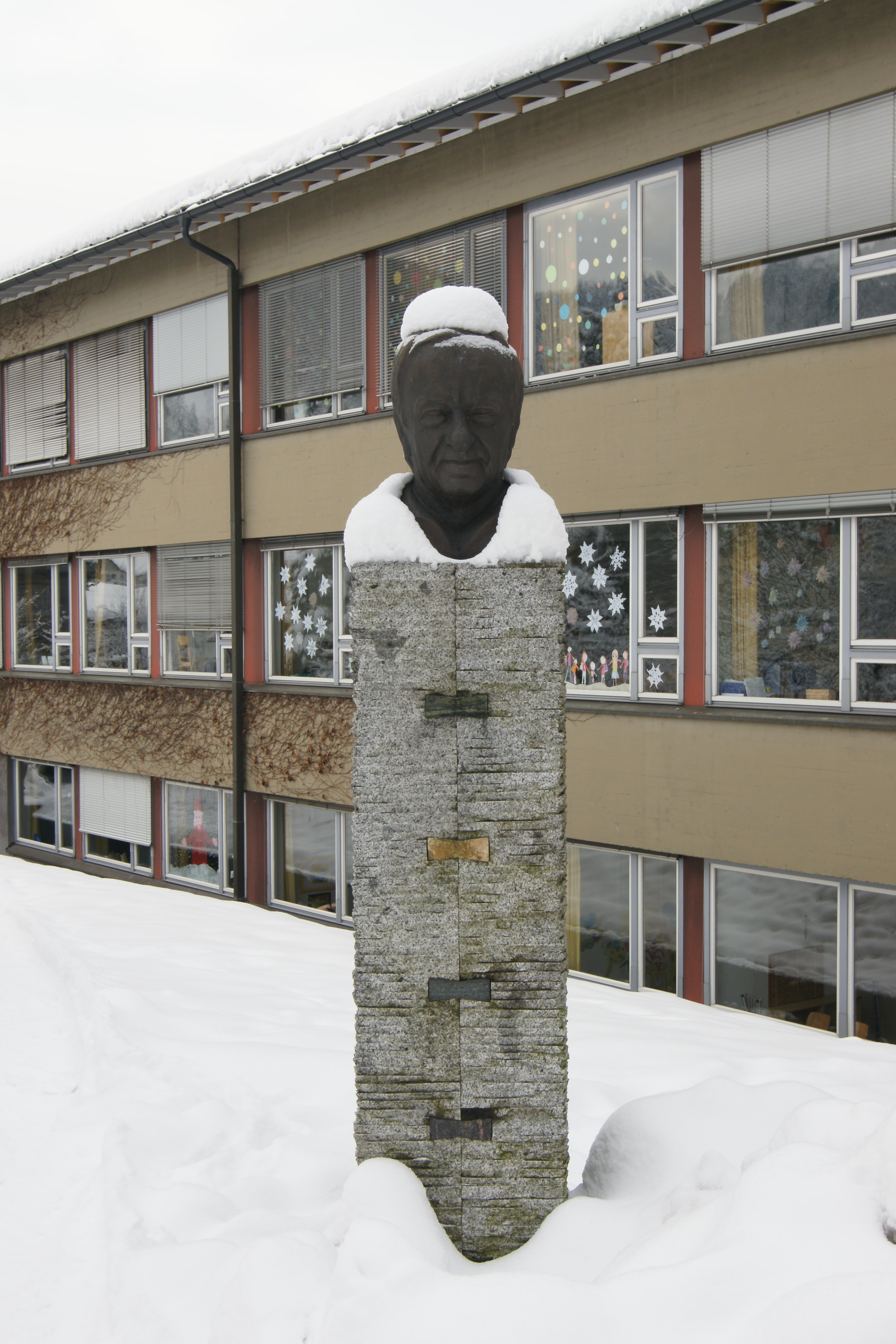 Volksschule Alberschwende im Bregenzerwald. Büste von Hermann GmeinerHermann Gmeiner.